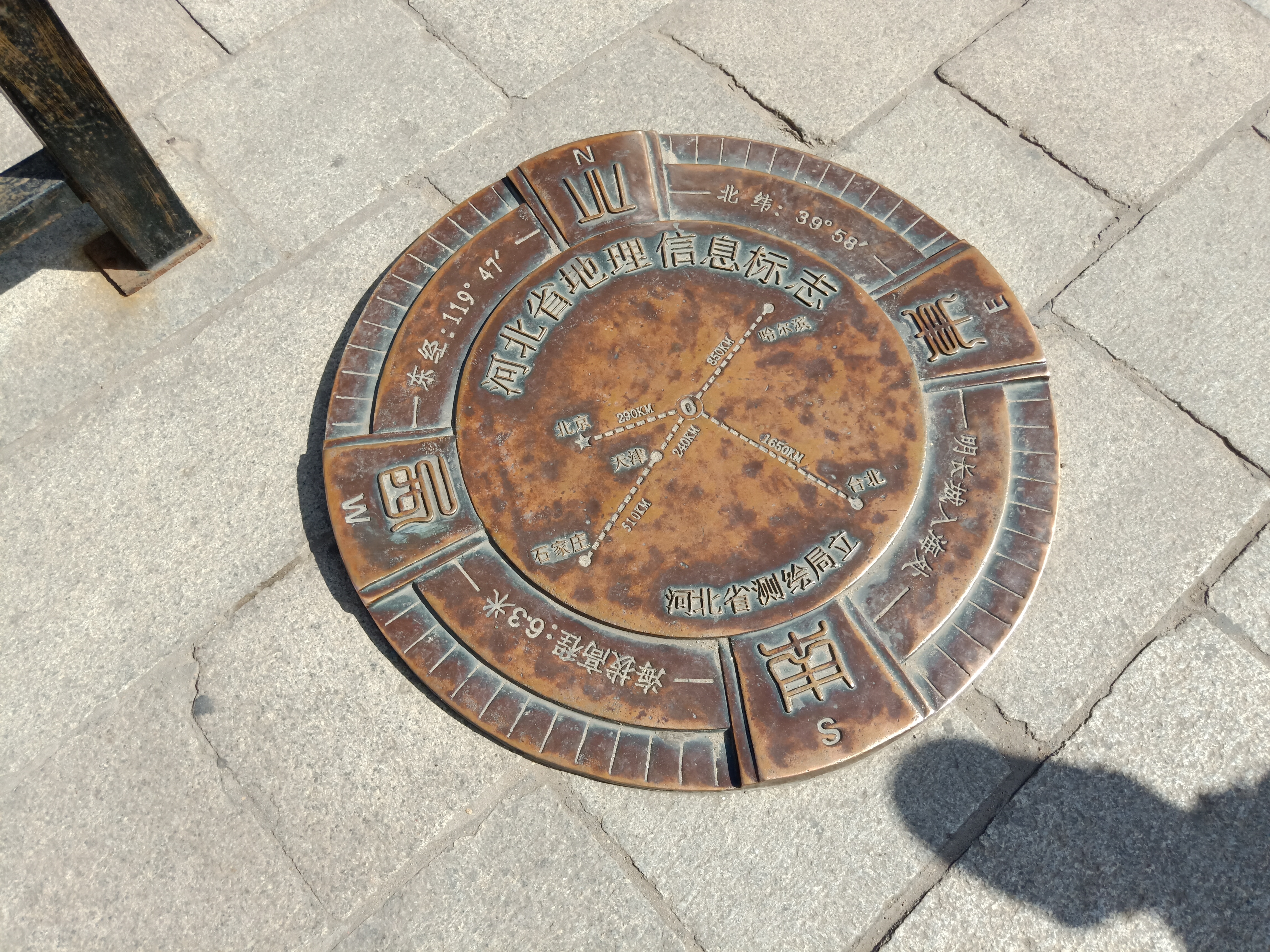 粵語: 明長城入海處地理信息標誌